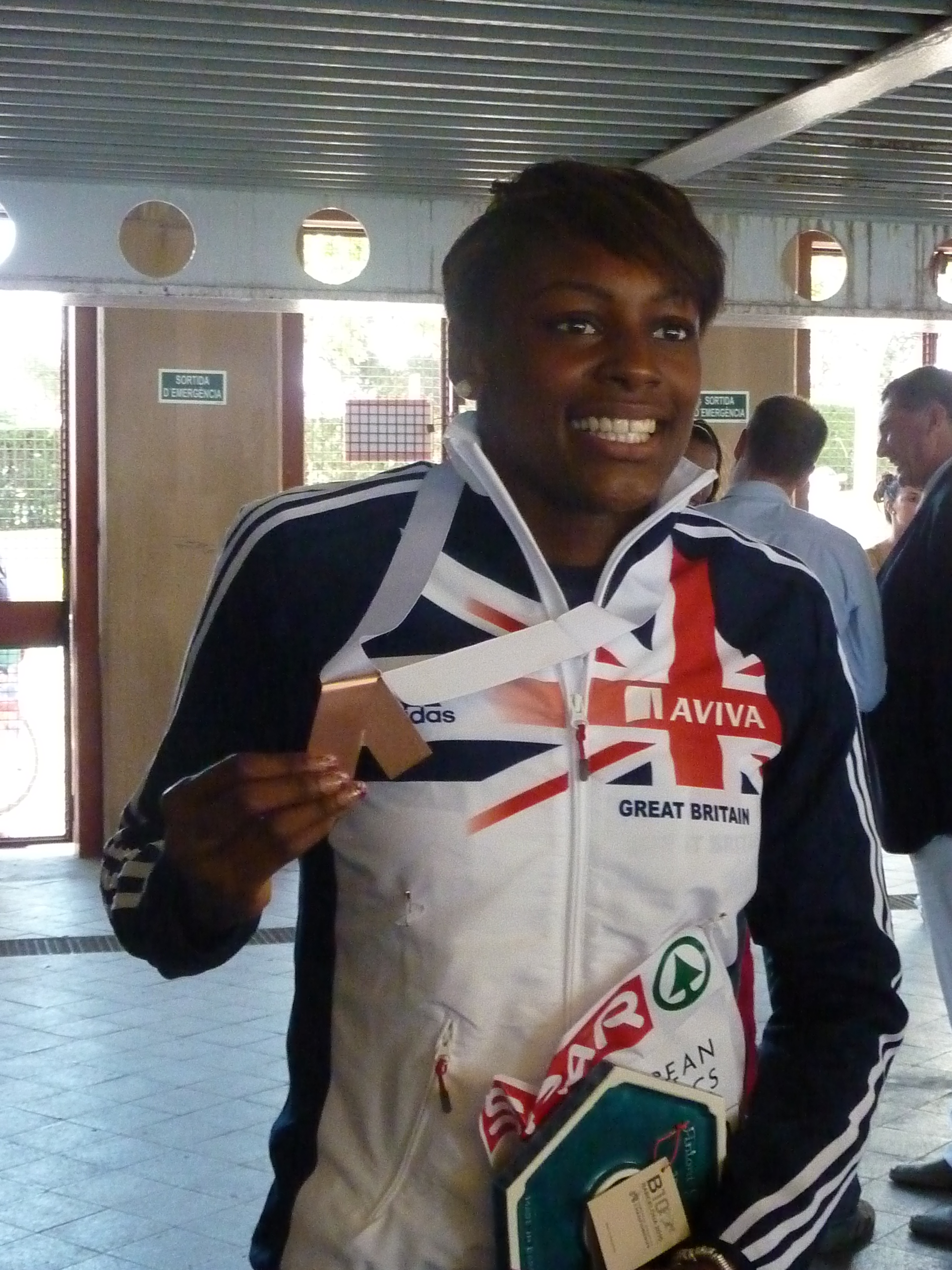 Perri Shakes-Drayton